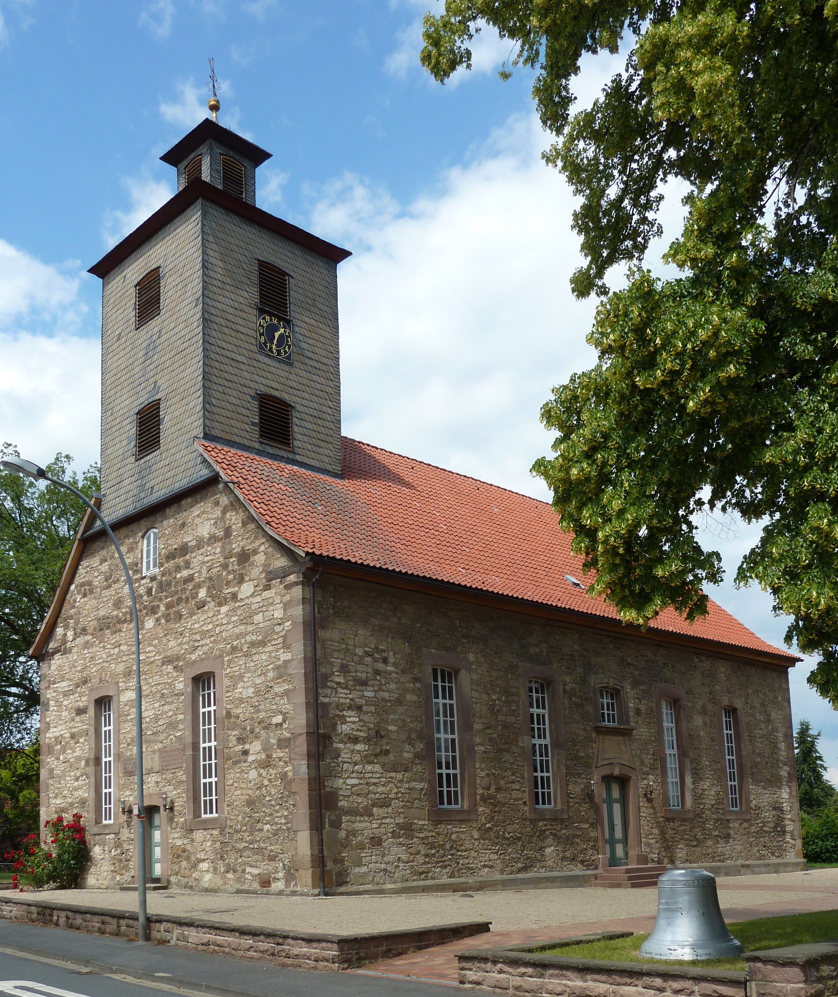 Ev.-luth. St.-Martini-Kirche in Lenglern, Flecken Bovenden, Niedersachsen. Erbaut 1780 bis 1784, Vorgängerbau wurde 1022 erstmals schriftlich erwähnt und 1754 abgerissen.